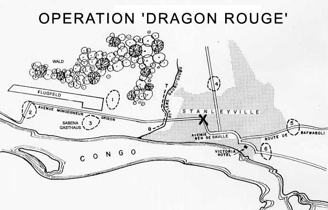 Lage: Operation 'Dragon Rouge' leicht verändert